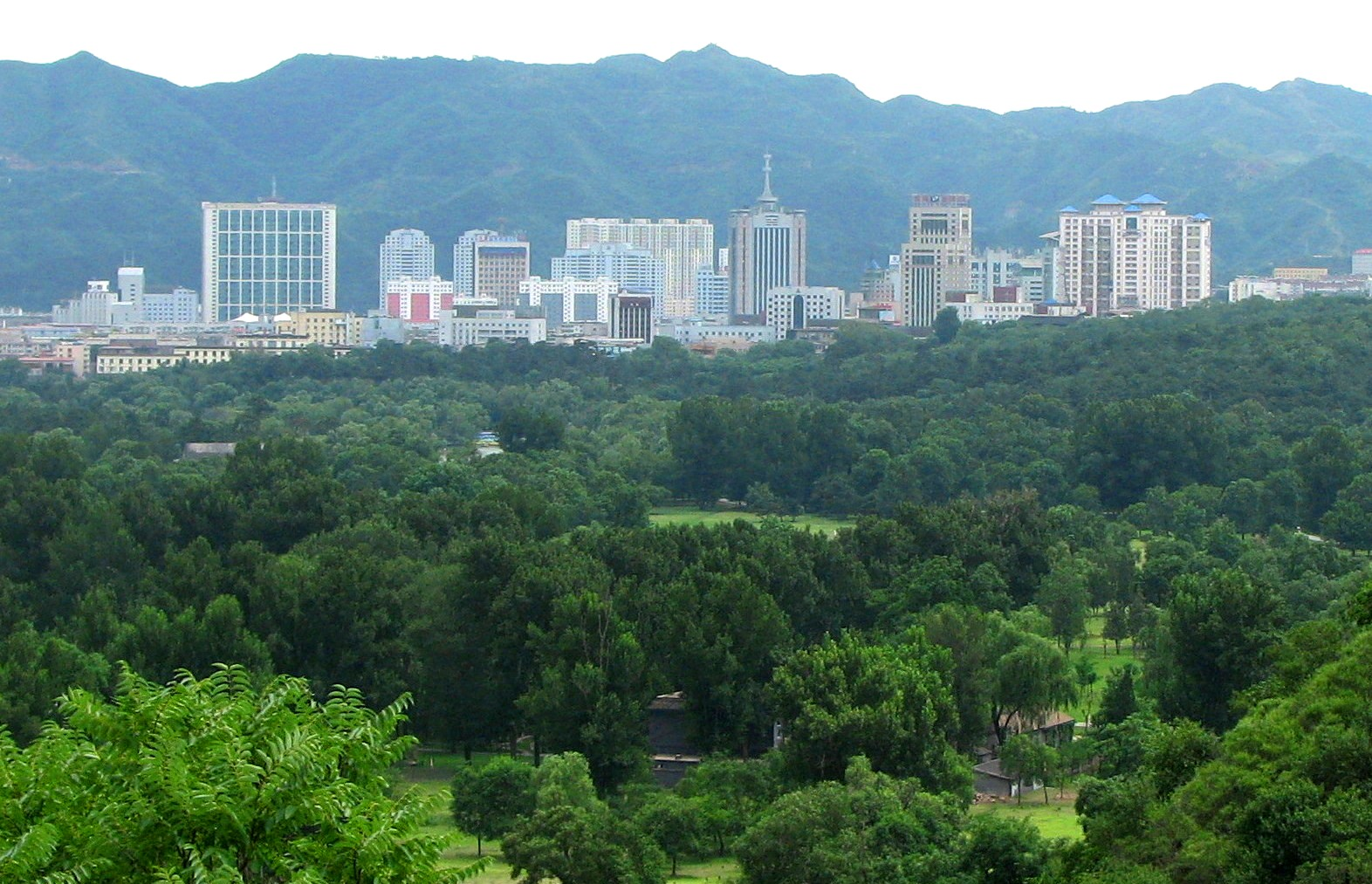 Chengde skyline.